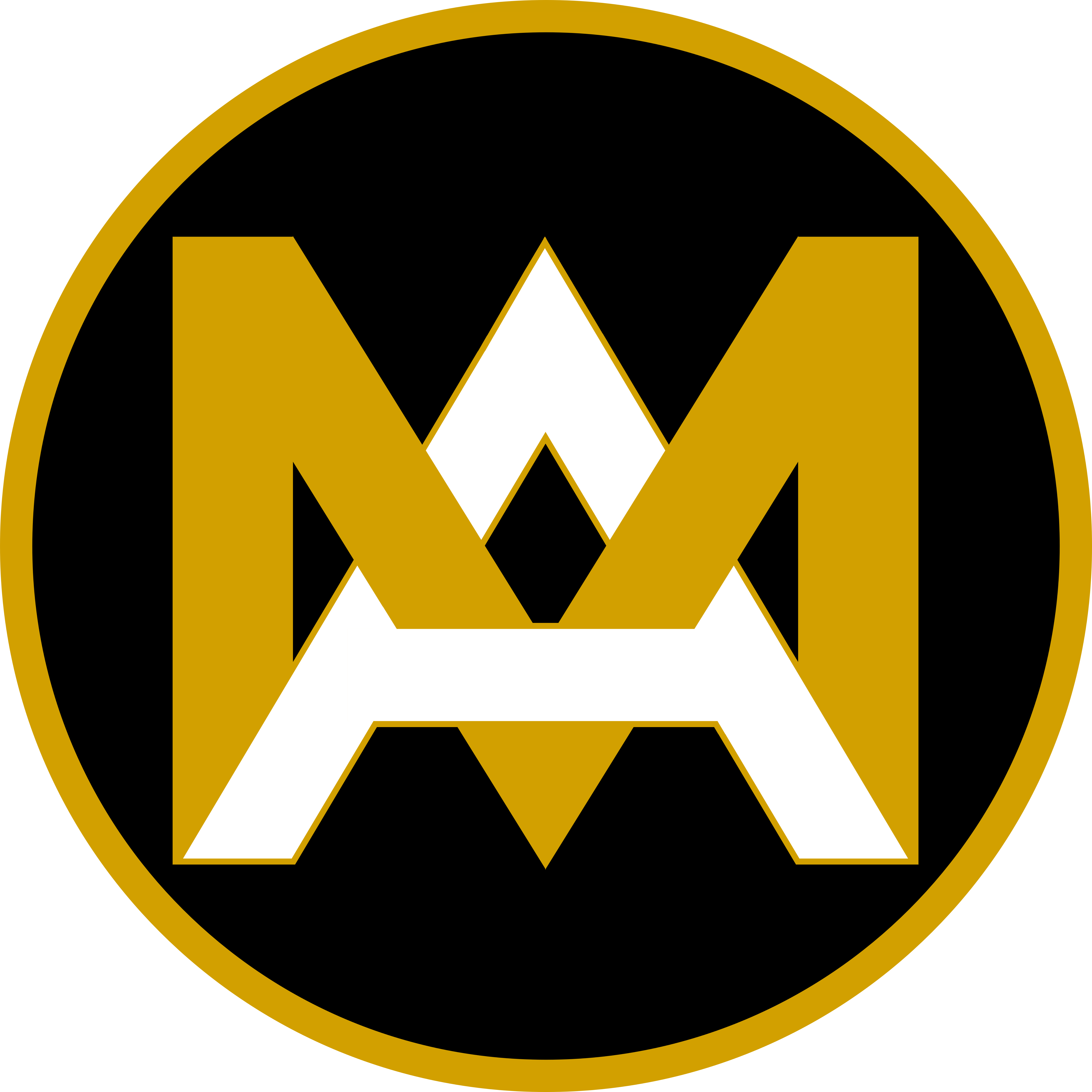 箕面有馬電気軌道の社章